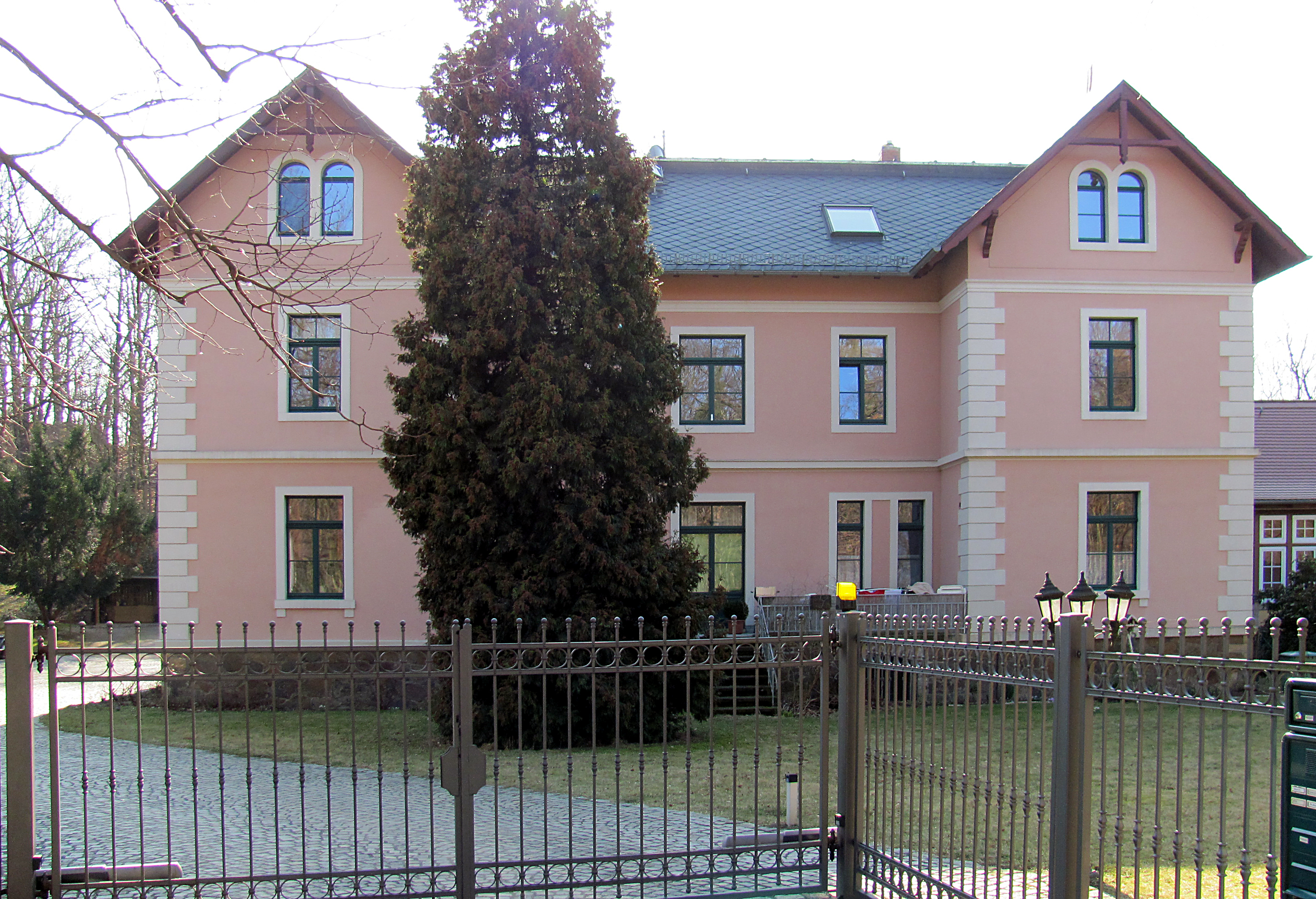 Radebeul, Frauen-Genesungsheim „Alt-Wettinhöhe“